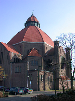 Eigen werk